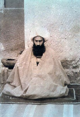 حاج ملاعلی گنابادی نورعلیشاه ثانی